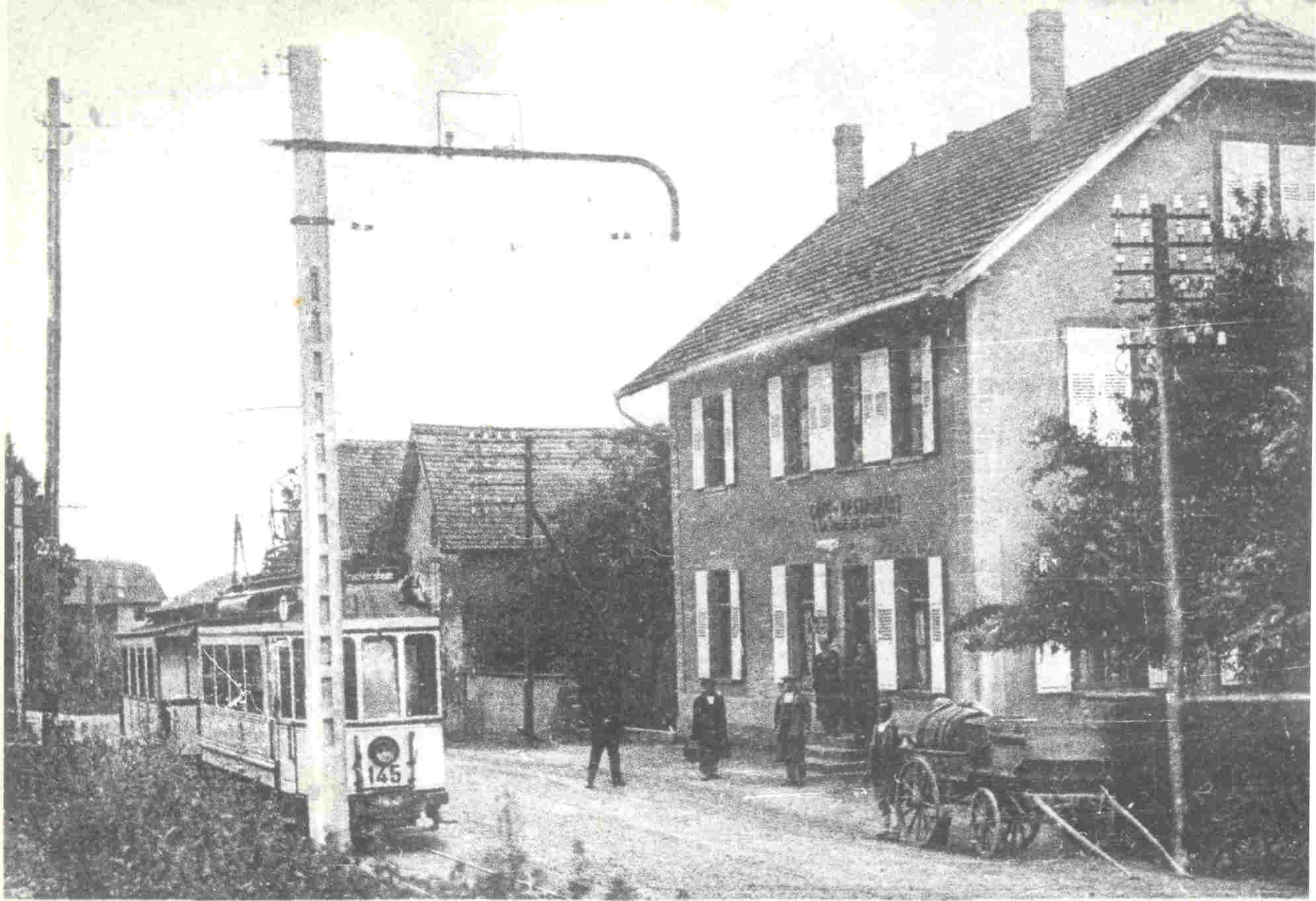 Tramway Offenheim station 1925